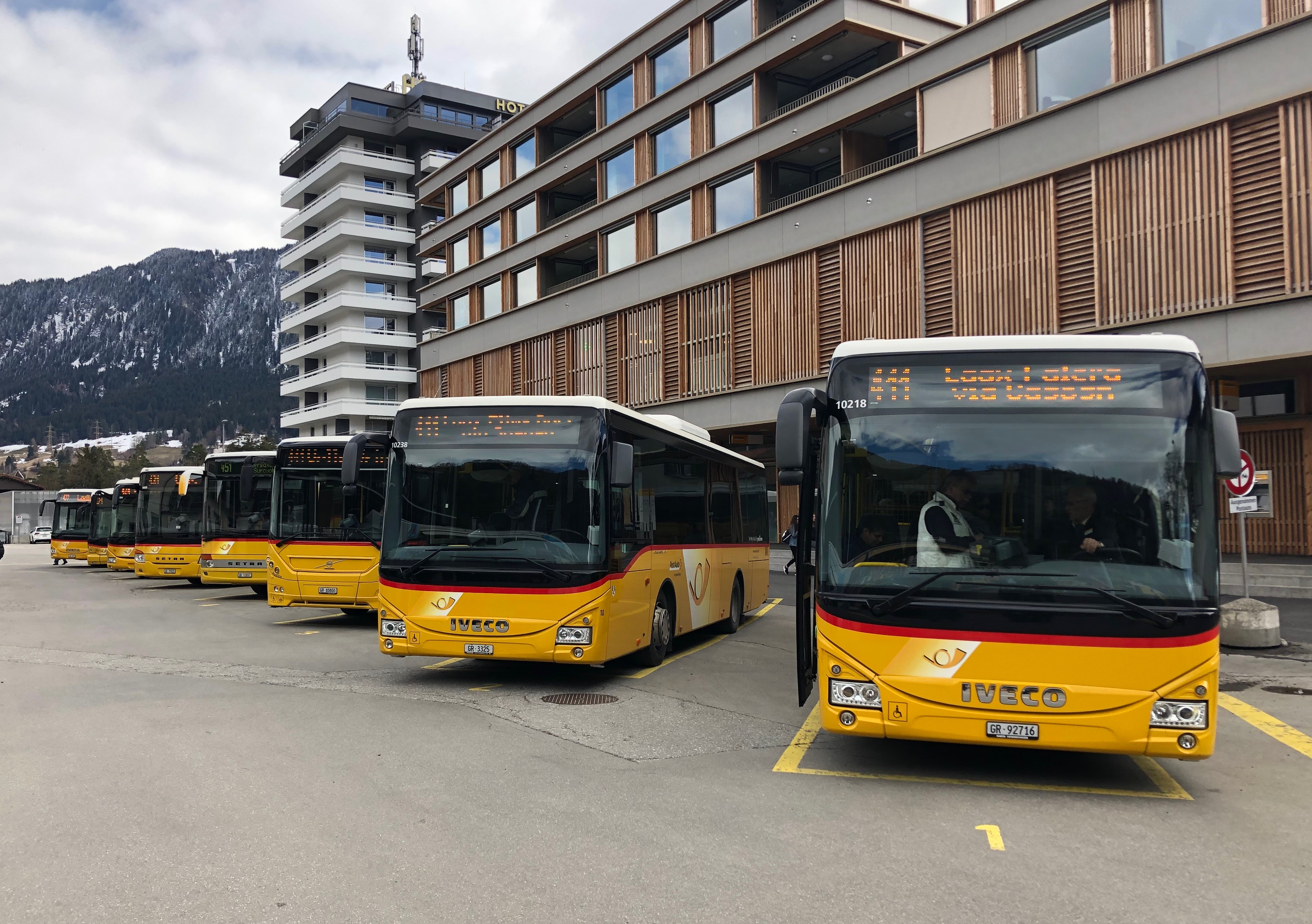 Bahnhof von Ilanz mit wartenden Postautos